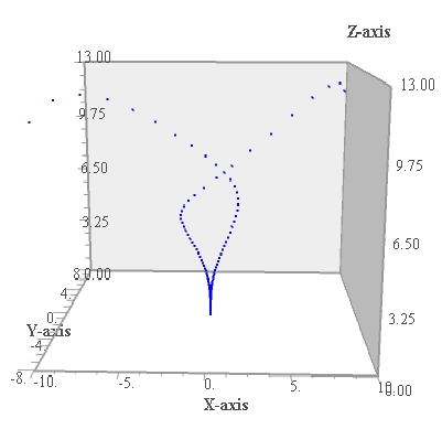 Система Лоренца, r = 0.3